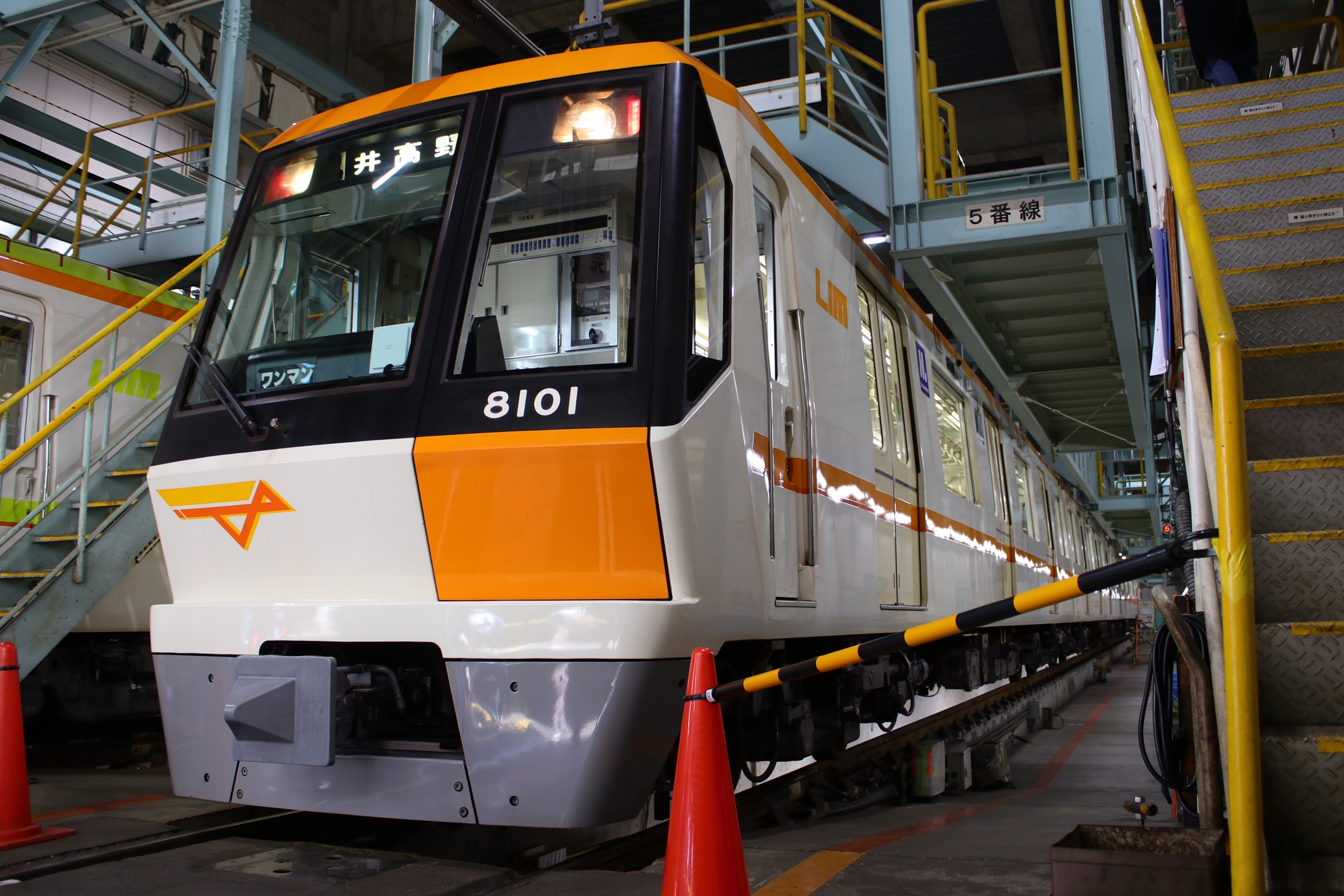 大阪市高速電気軌道 今里筋線80系 8101F（2019年5月 鶴見検車場） Canon EOS 80D